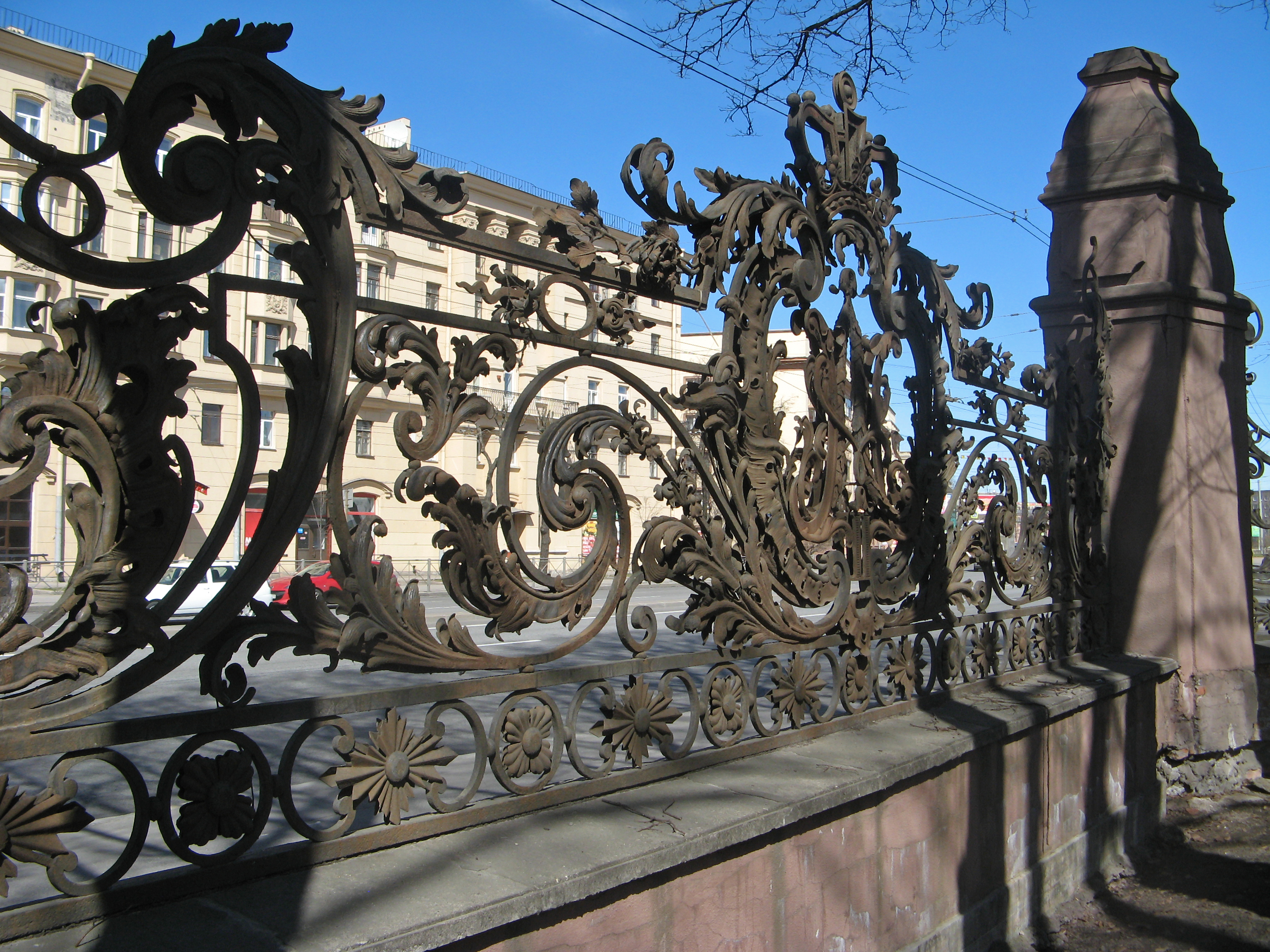 Ограда: проспект Стачек, 20, Кировский район, Санкт-Петербург